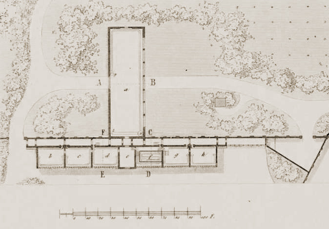 Grundriss der Orangerie in Glienicke, Veröffentlichung von Persius 1842